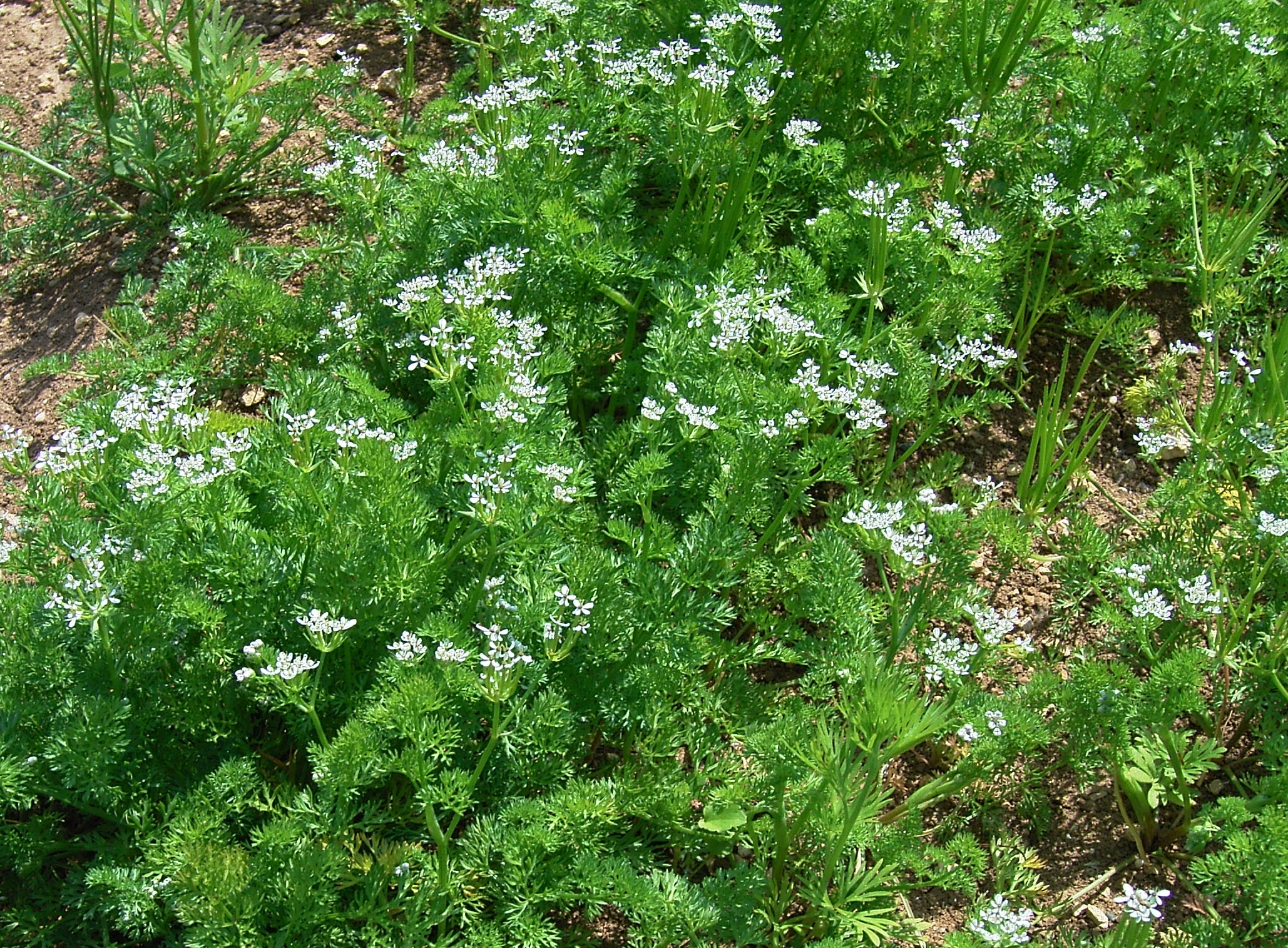 Scandix pecten-veneris (Venuskamm)